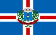 Drapeau de la municipalité de Guaraciaba - Brésil